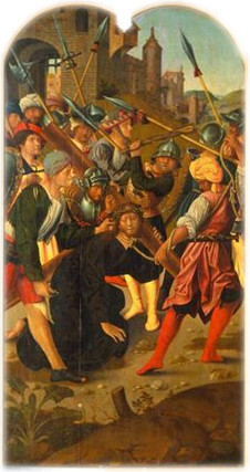 Baseado em gravuras de Durer e de Martin Schongauer